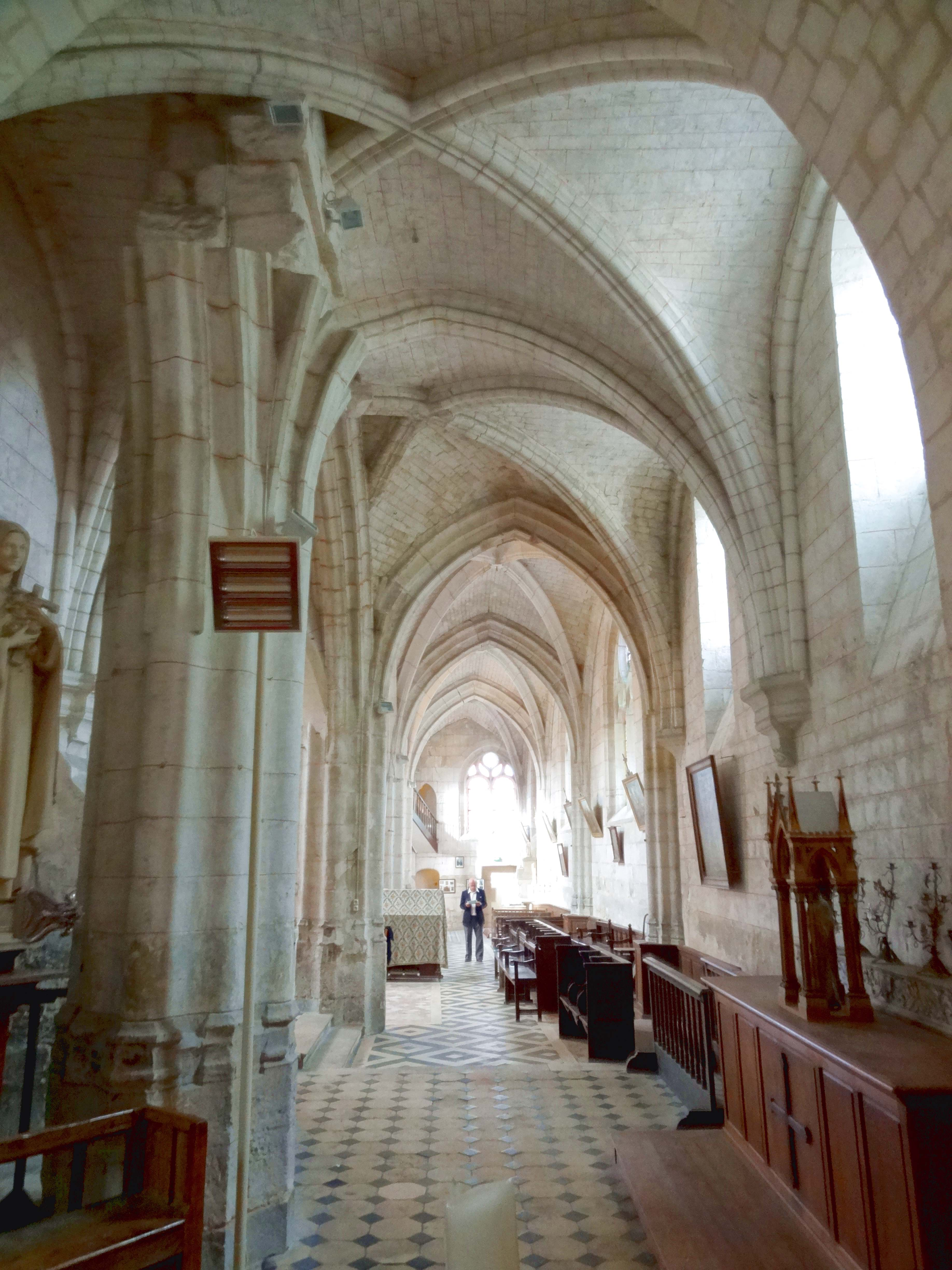 Intérieur de l'église - voir titre.